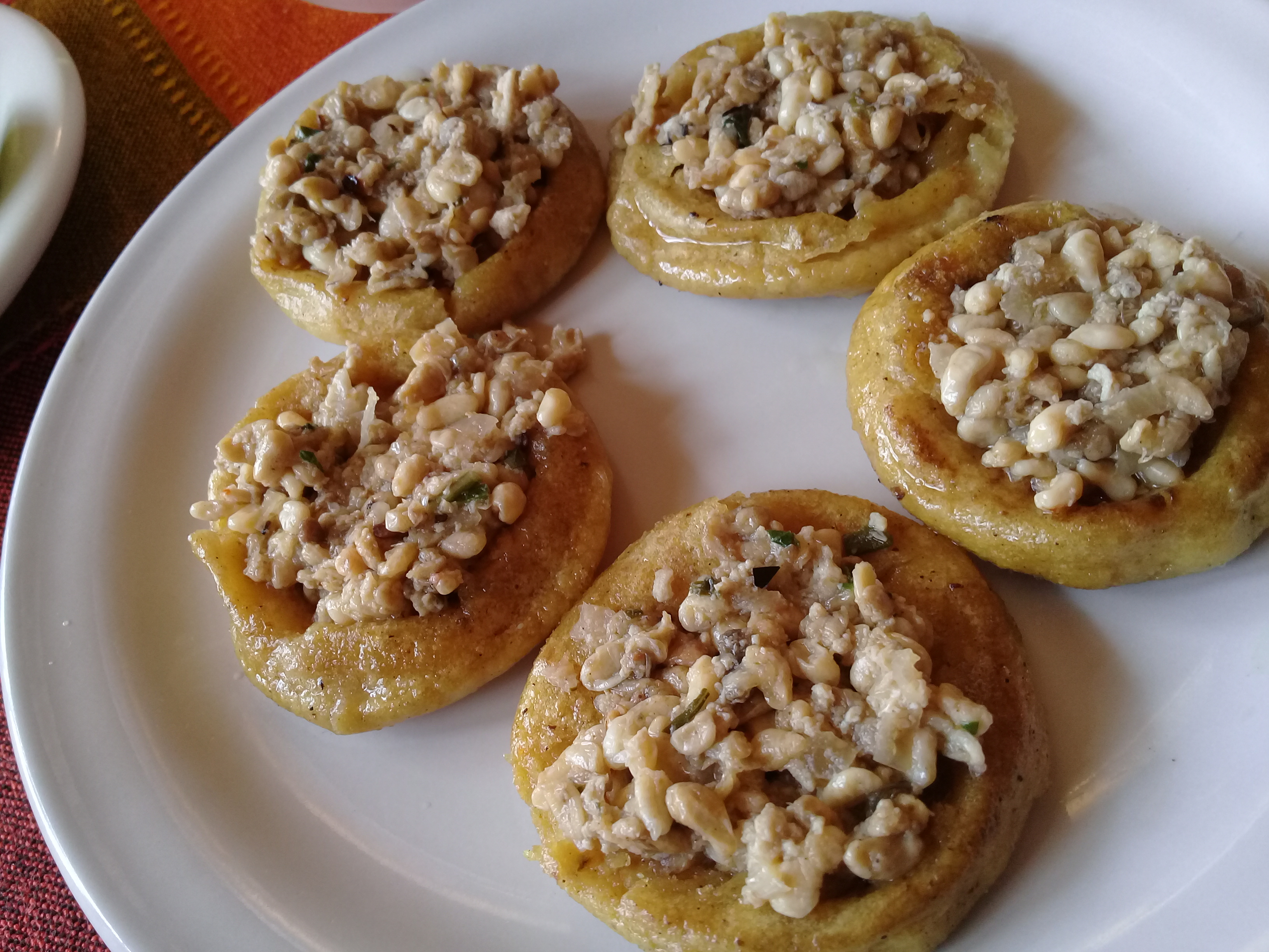 Gorditas con Escamoles de Calpulalpan, Tlaxcala